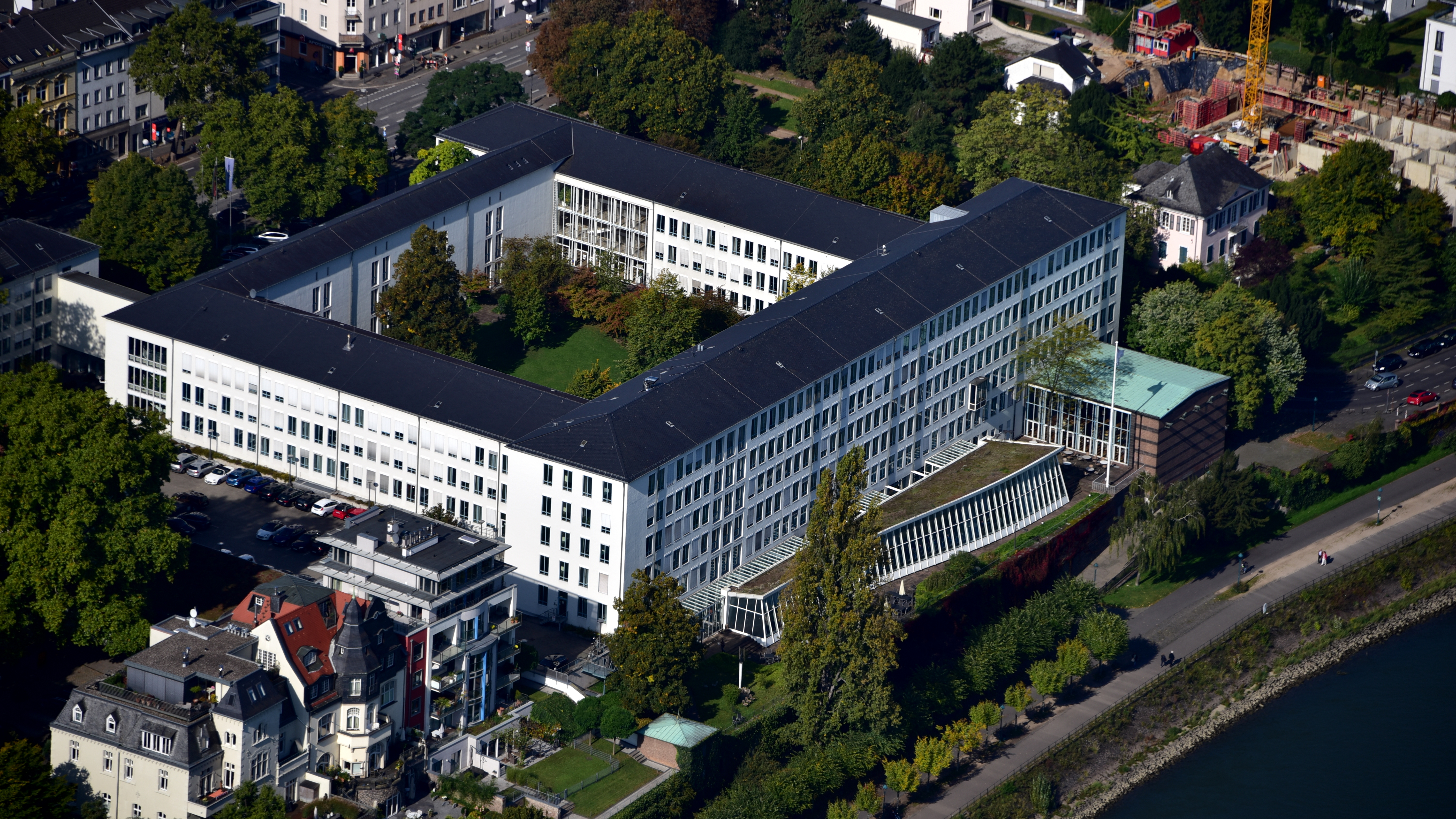 Bonn, Adenauerallee 83, Bundesrechnungshof, Luftaufnahme (2017)